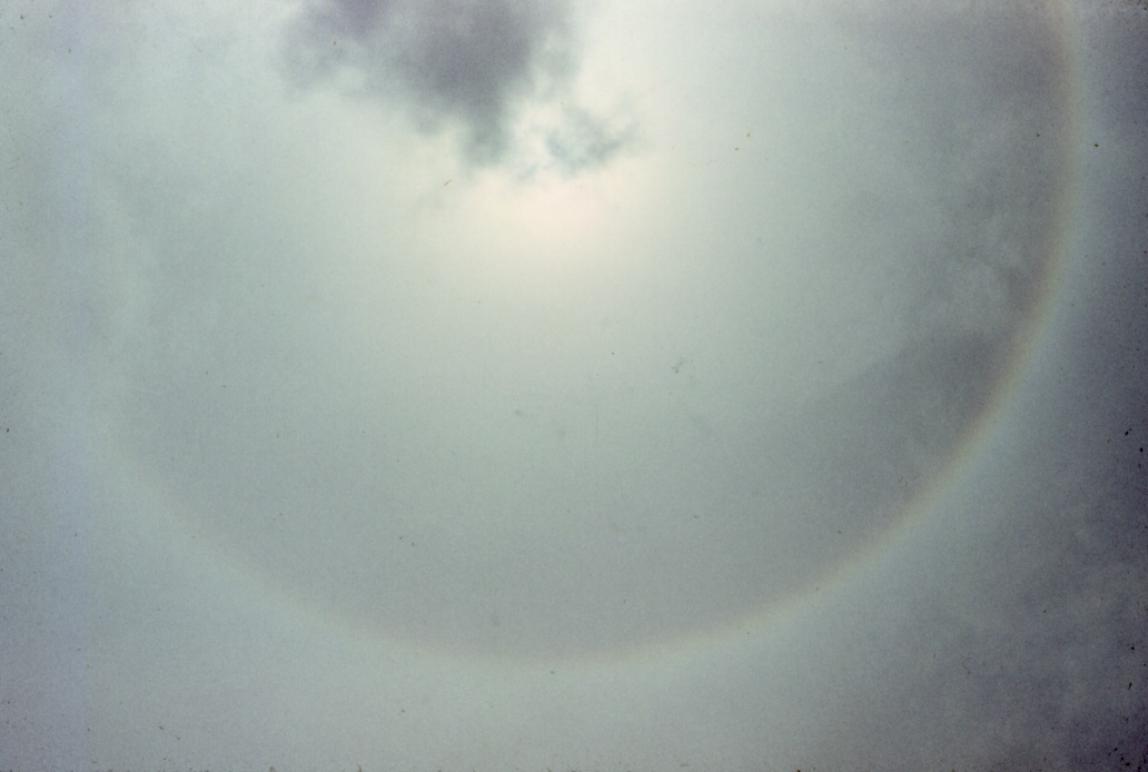 22° halo.